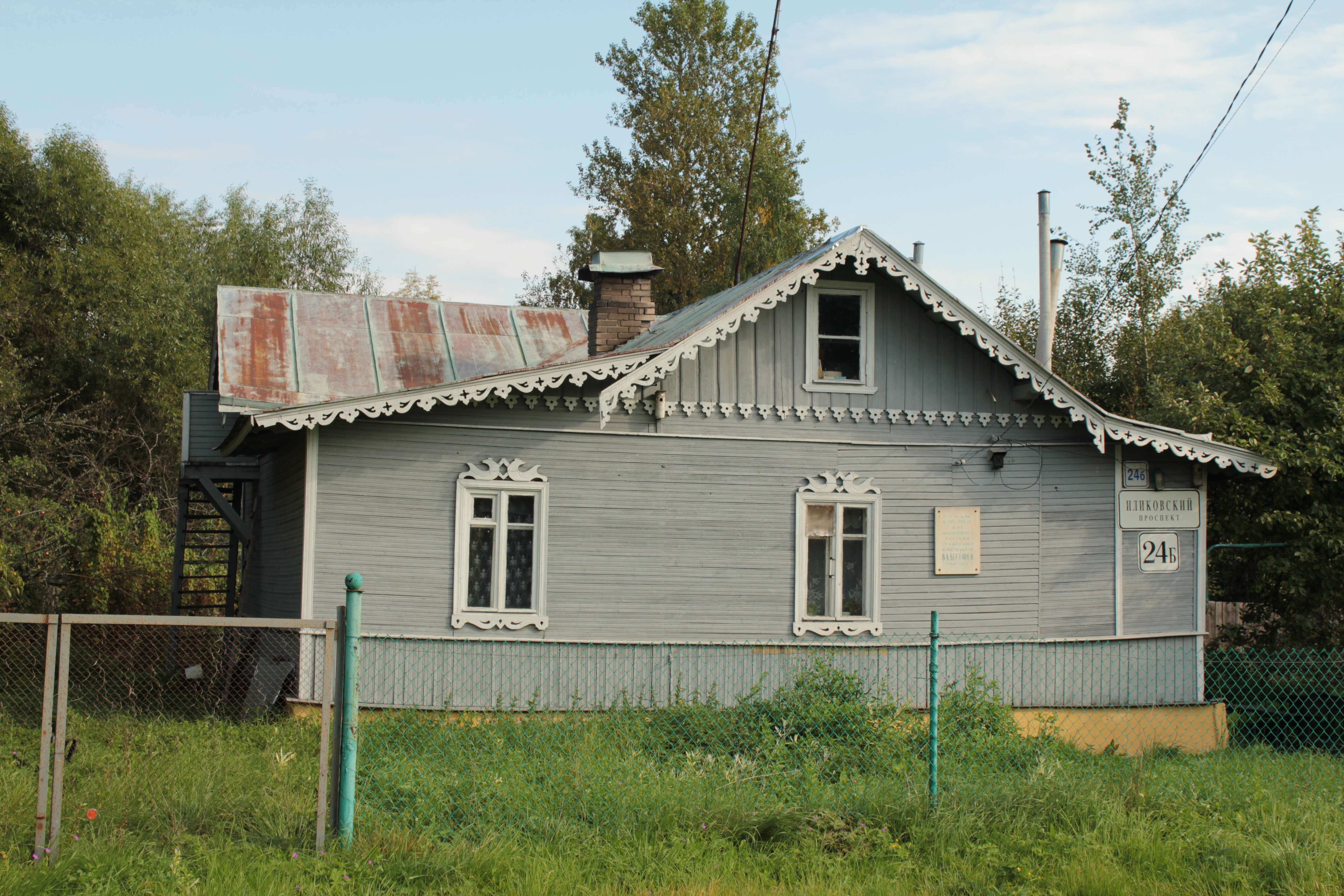 В котором жил в 1915—1916 гг. жил оружейный конструктор Дегтярев В. А. (Санкт-Петербург и Лен.область, Ломоносов, Иликовский проспект, 24-б)